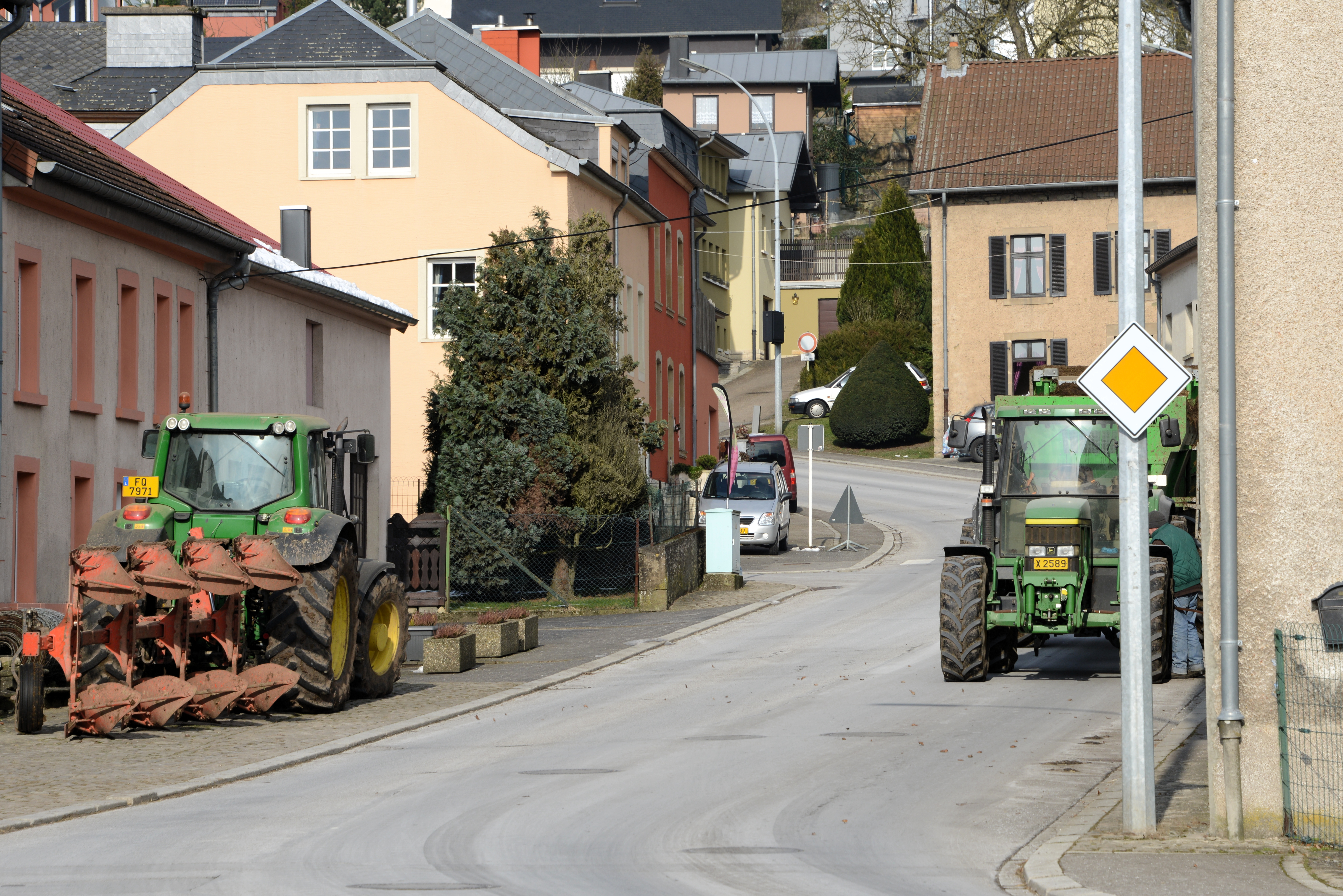 Trakteren an der Éiterstrooss zu Bus.